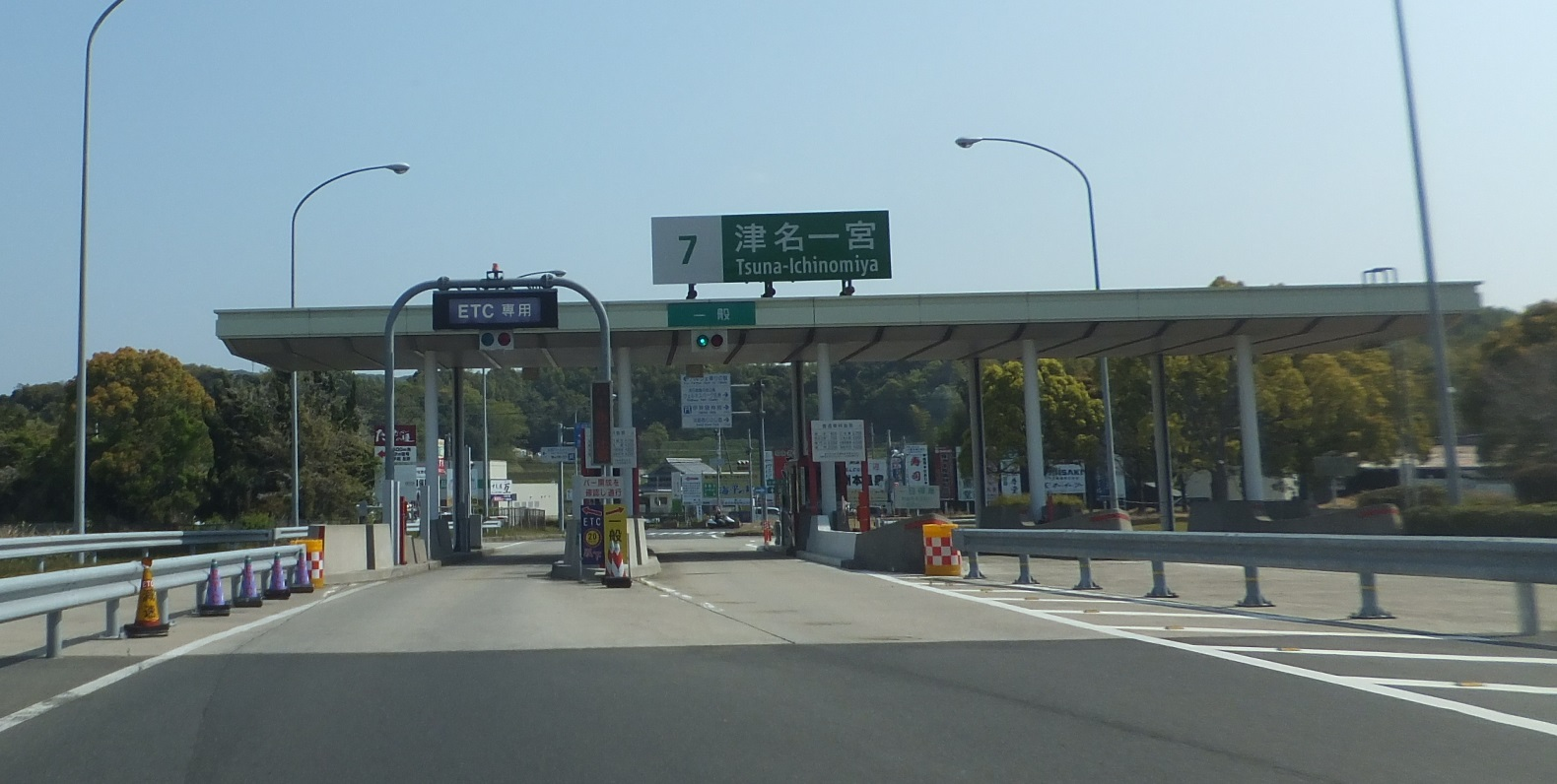 津名一宮インターチェンジ（2013年4月27日撮影）